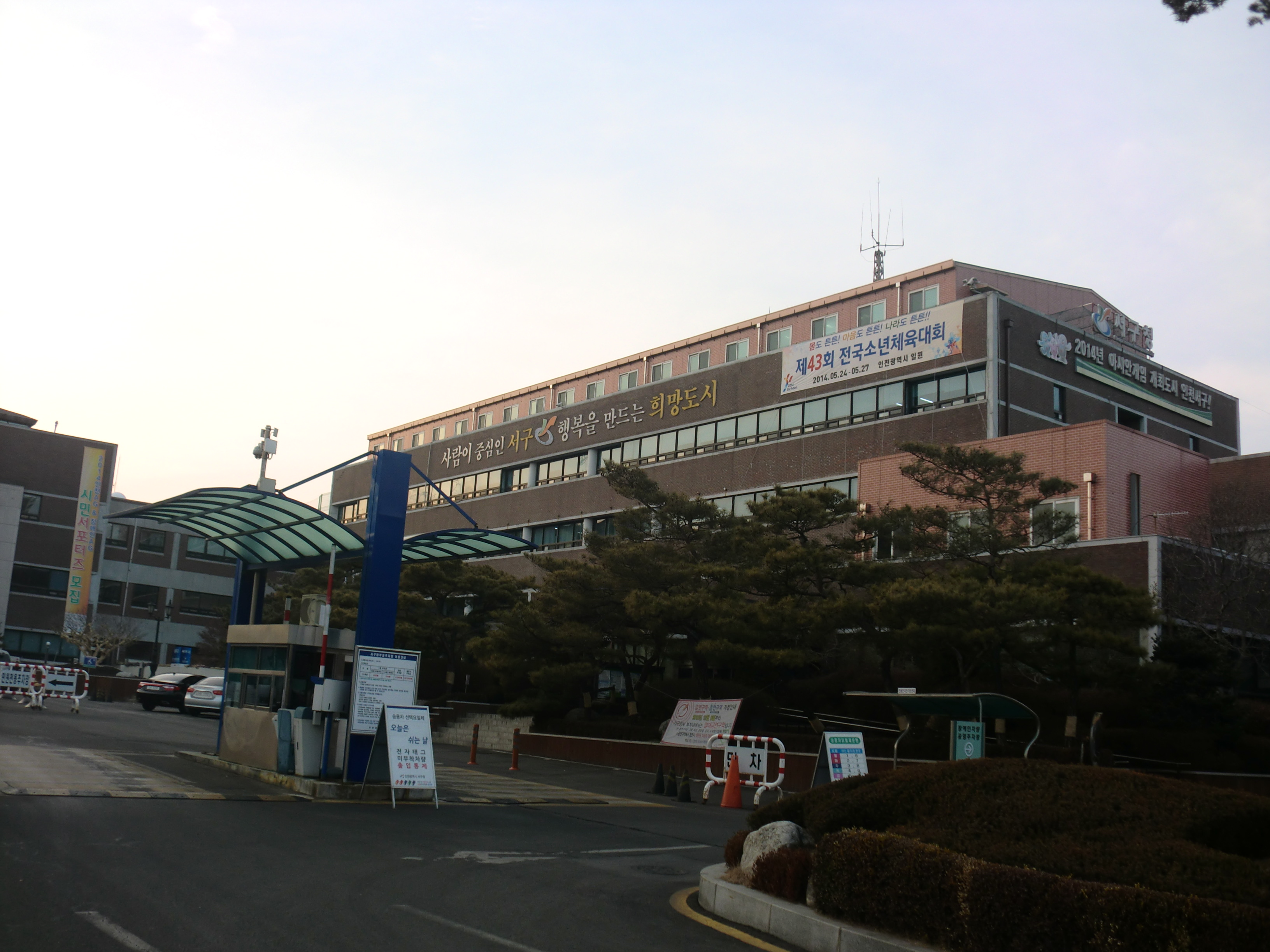 인천광역시 서구에 있는 서구청